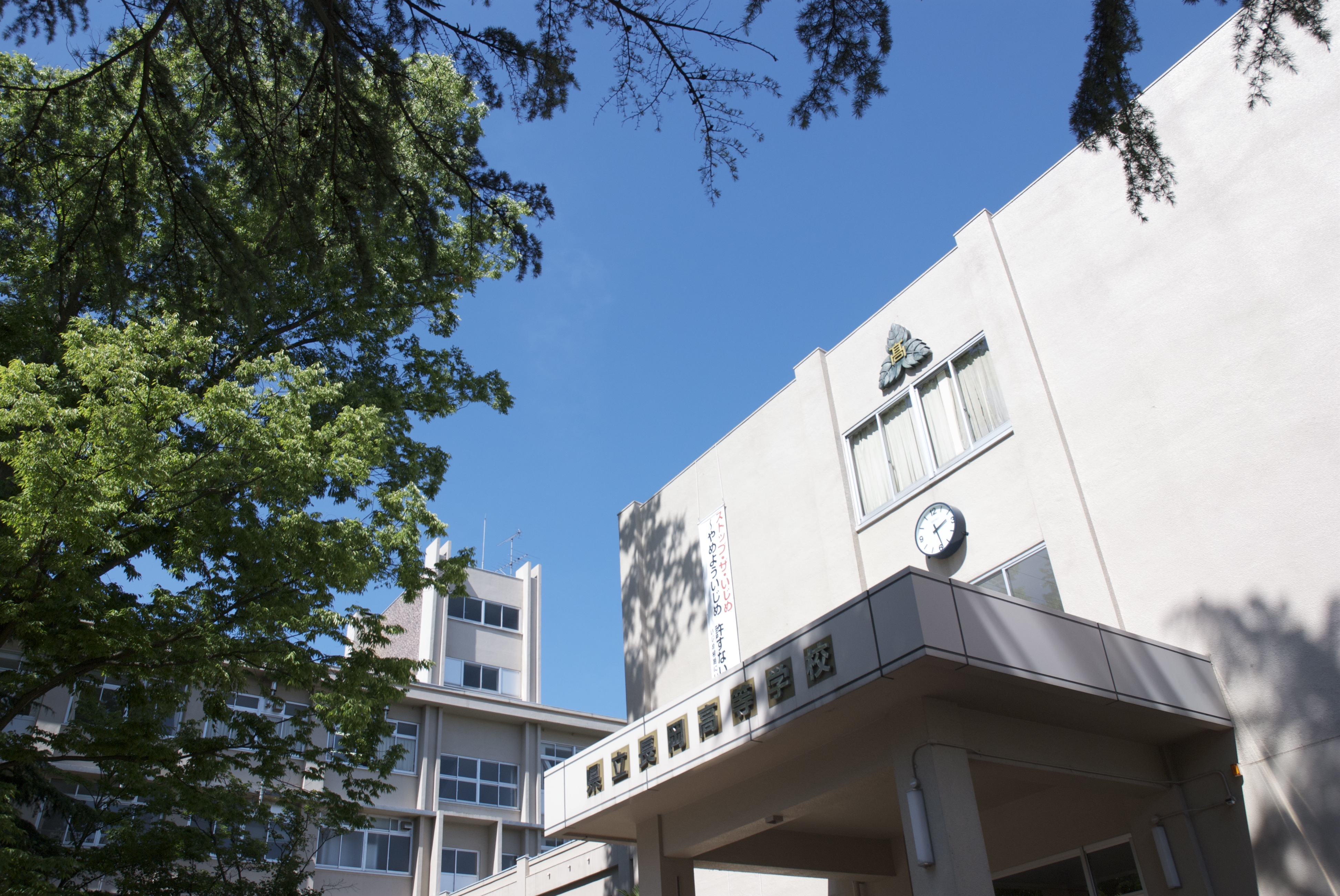 長岡高校職員玄関と特別教室棟 （原典のアップロード日時：2010年6月19日16:49）